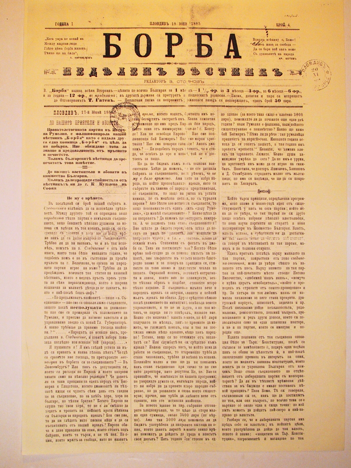 Вестник "Борба", брой 4, 18 юни 1885.